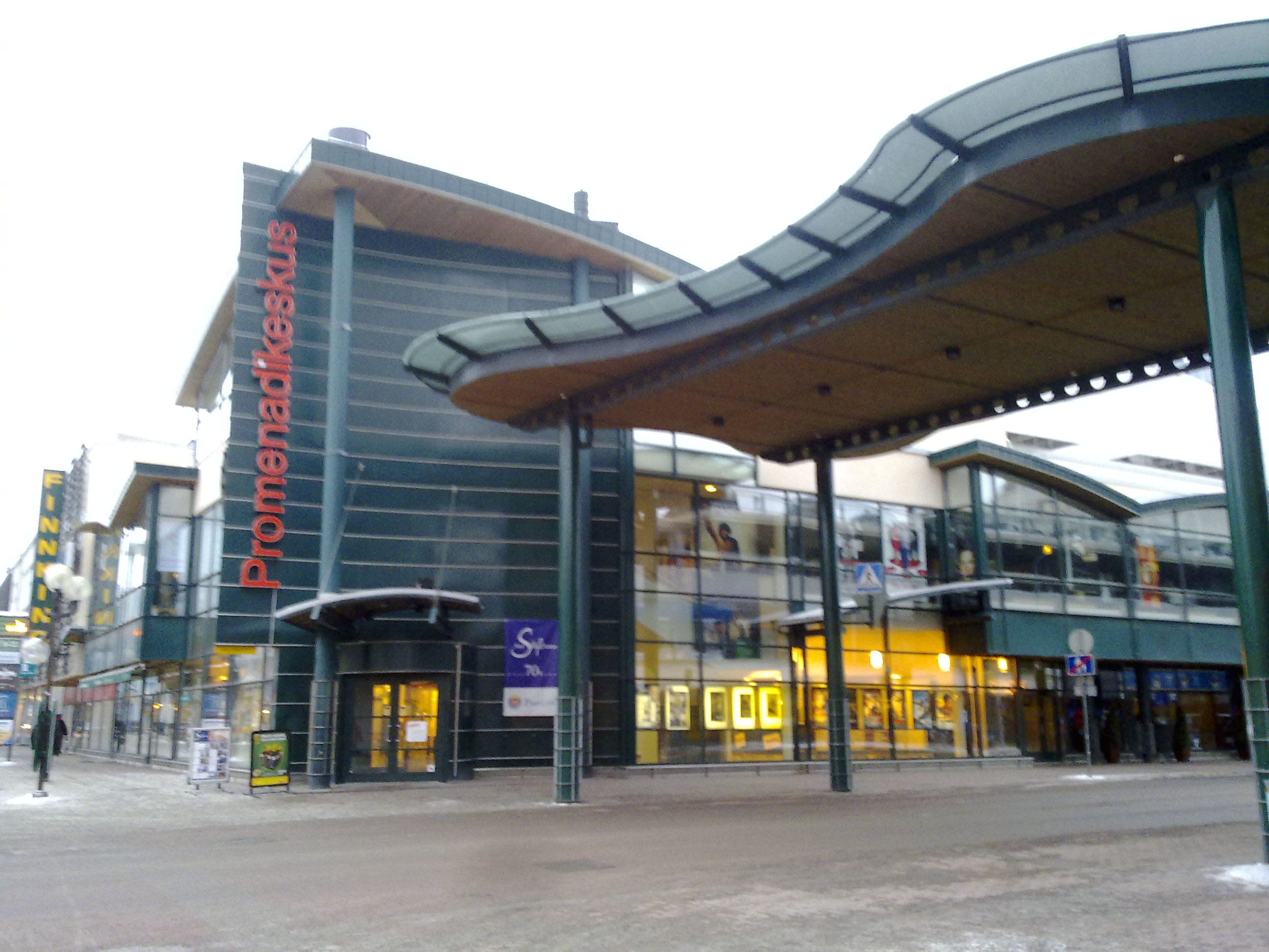 Promenadikeskus Porissa.